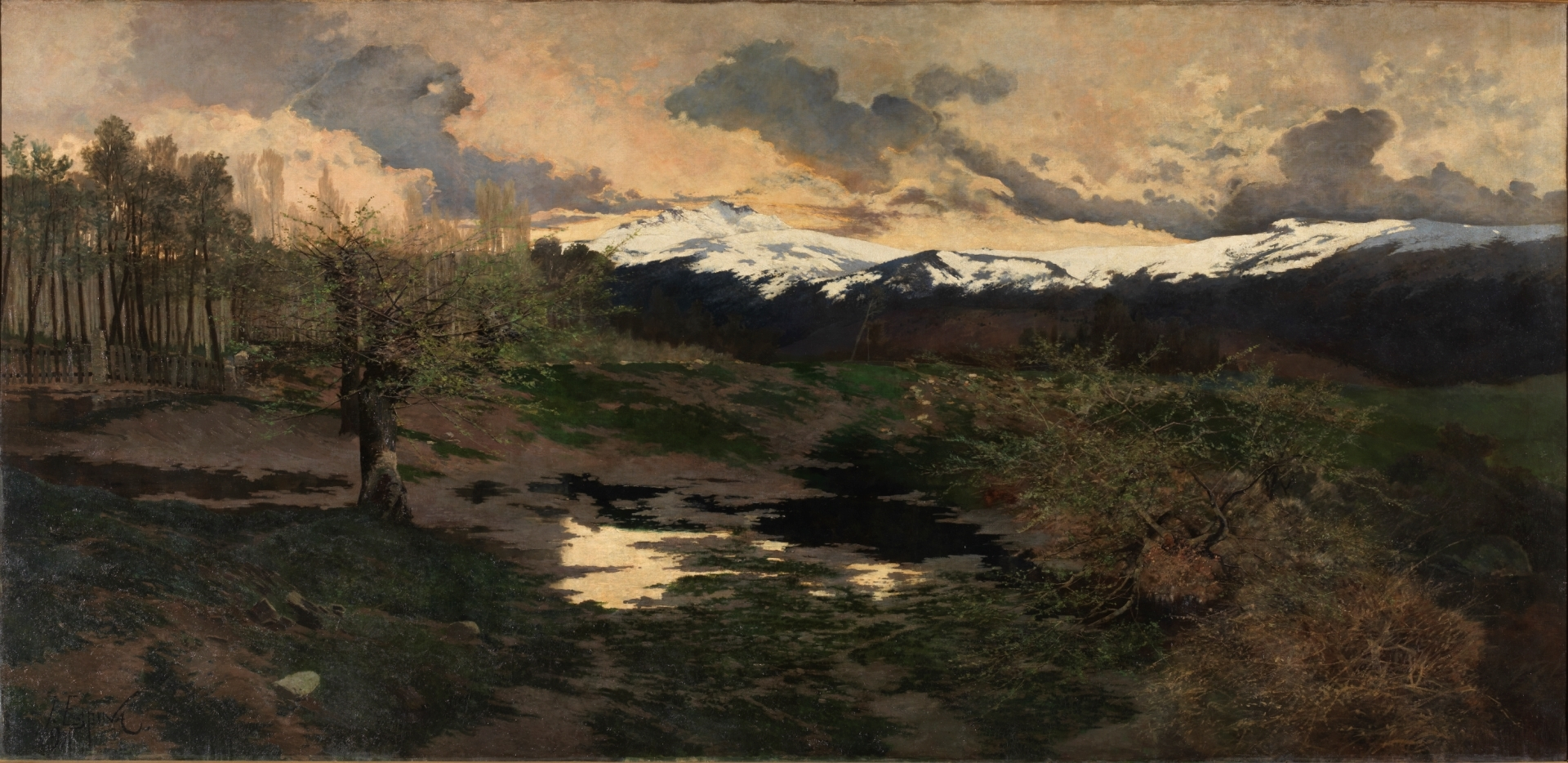 El pico de Peñalara (Rascafría) (1897), de Juan Espina y Capo. Óleo sobre lienzo, 162 x 330 cm. Museo del Prado, Madrid, España